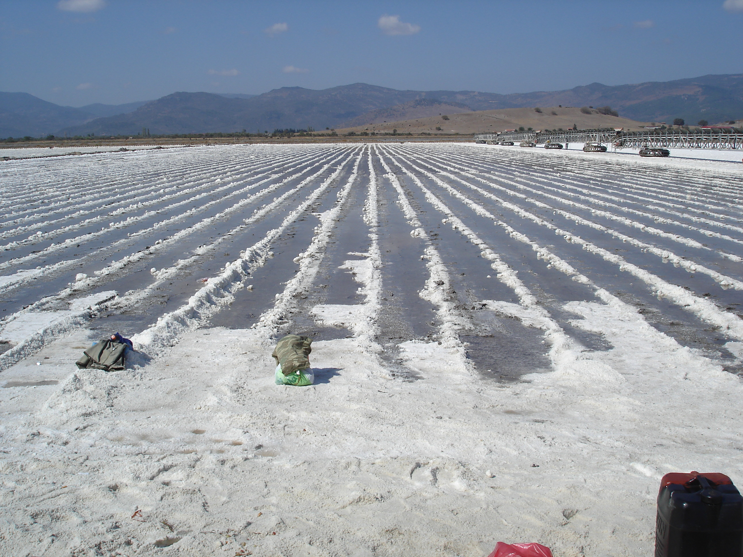 after the scraping of the salt